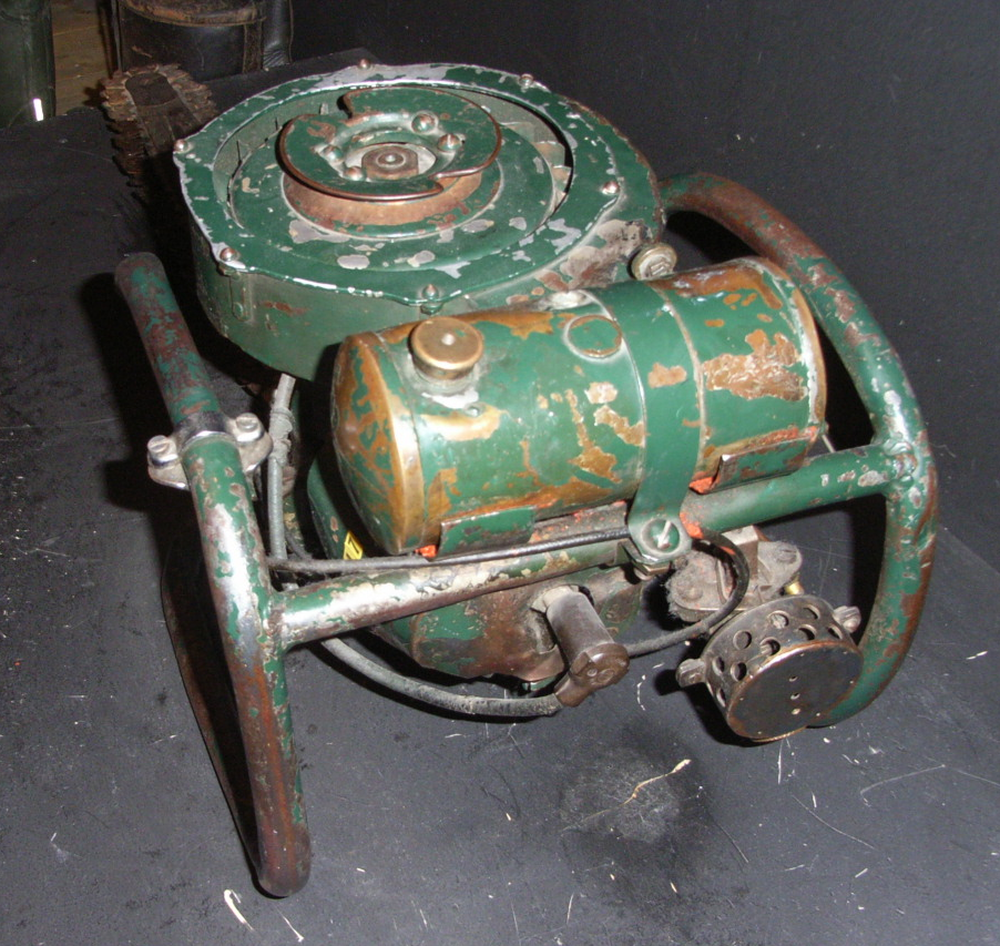 Jo-Bu Primus (prototype)